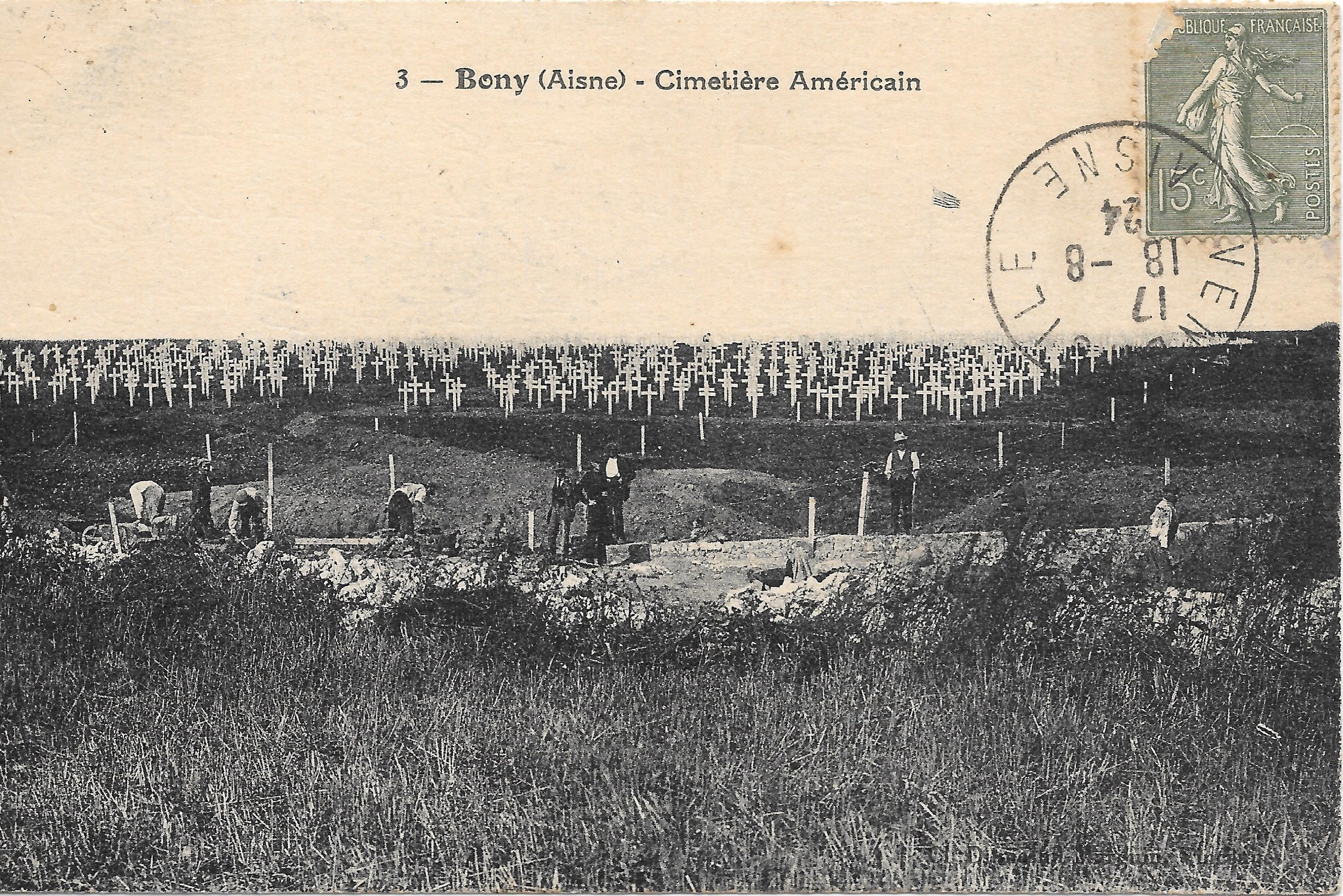 Le cimetière militaire en travaux vers 1920